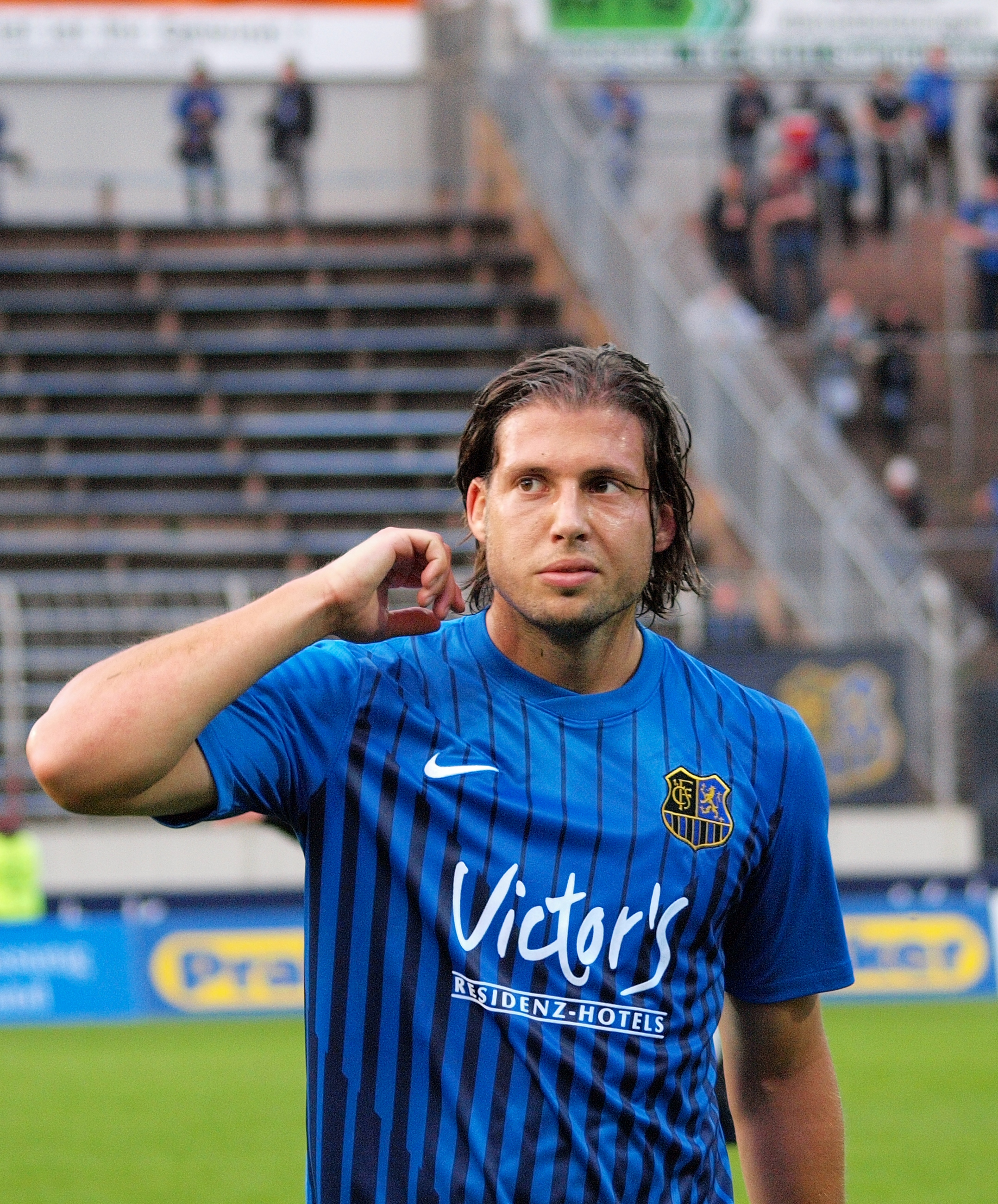 Marius Laux hier im Trikot des 1.FC Saarbrücken zu sehen